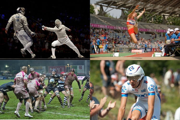 Assemblage de quatre photo : File:USO-Sale Sharks - 20131205 - Ballon flottant.jpg File:Thibaut Pinot - TDF 2012.jpg File:Kovalev v Szilagyi 2013 Fencing WCH SMS-IN t194135.jpg File:Women heptathlon LJ French Athletics Championships 2013 t144221.jpg